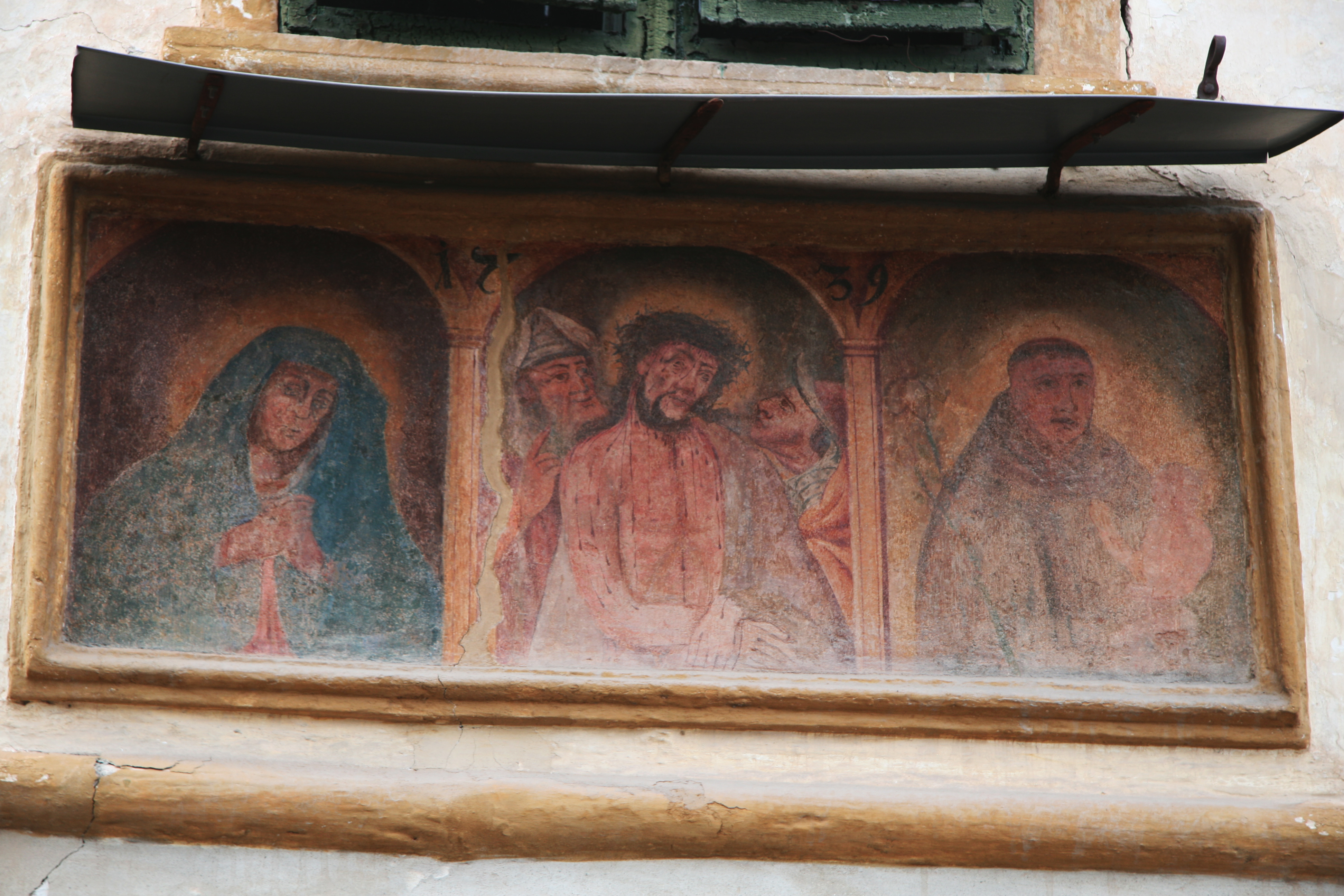 Brüstungsmalerei am Erker des Gebäudes Krumbachweg 10 in Kaltern, Südtirol